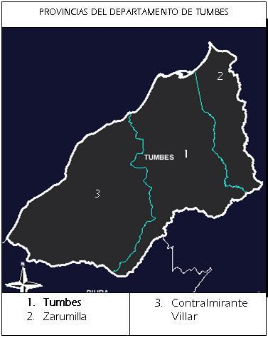 División política de Tumbes. Provincias de tumbes